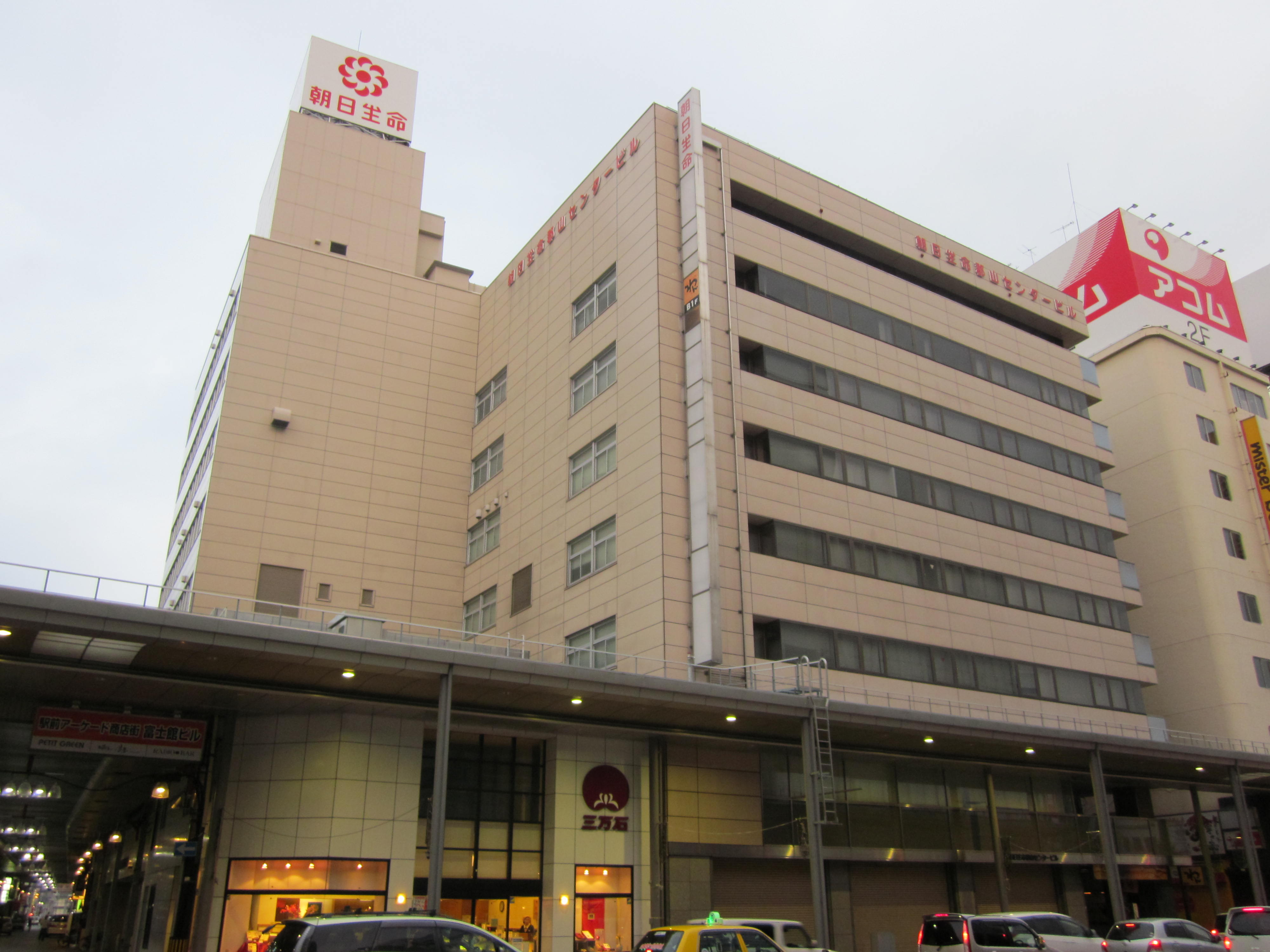 朝日生命郡山センタービル（現在のエリート42ビル） 旧・丸光郡山店。